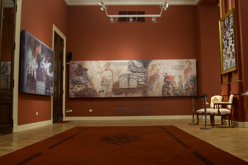 Este espacio fue inaugurado el 14 de abril de 2014, reemplazó al anteriormente denominado Salón Colón y fue bautizado en homenaje a los pueblos originarios. Se sitúa en la planta baja del Palacio de Gobierno, de cara al Río de la Plata, y dispone de una hermosa vista a la plaza Colón.